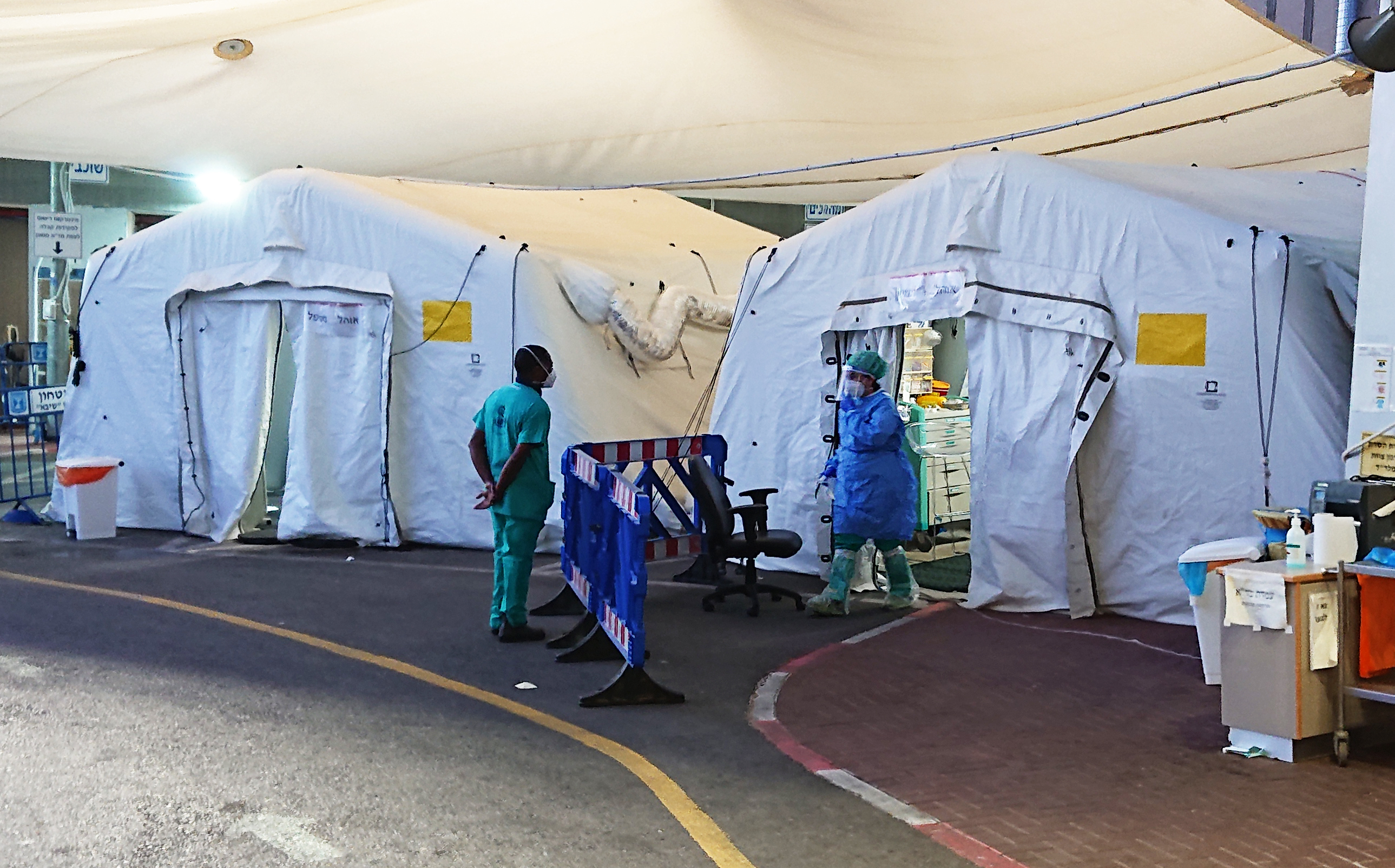 אוהלי קורונה בבי"ח שיבא ליד הכניסה למיון